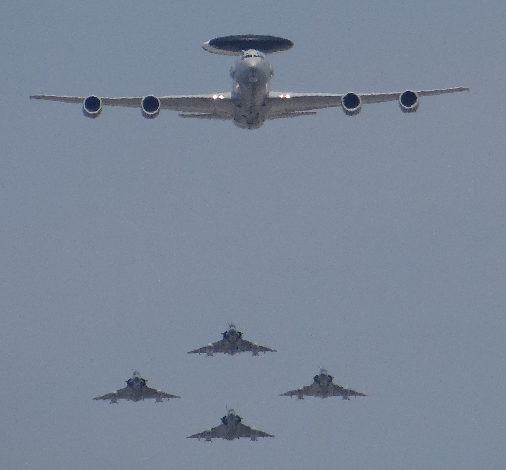 Défilé aérien du 14 juillet 2018 à Paris : 1 E-3F EDCA 00 036 Berry, 4 Mirage 2000-5 E1-2 Cigogne